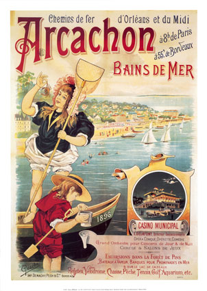 Affiche de la fin du XIXe siècle faisant la promotion d'Arcachon (France-Aquitaine-Gironde)